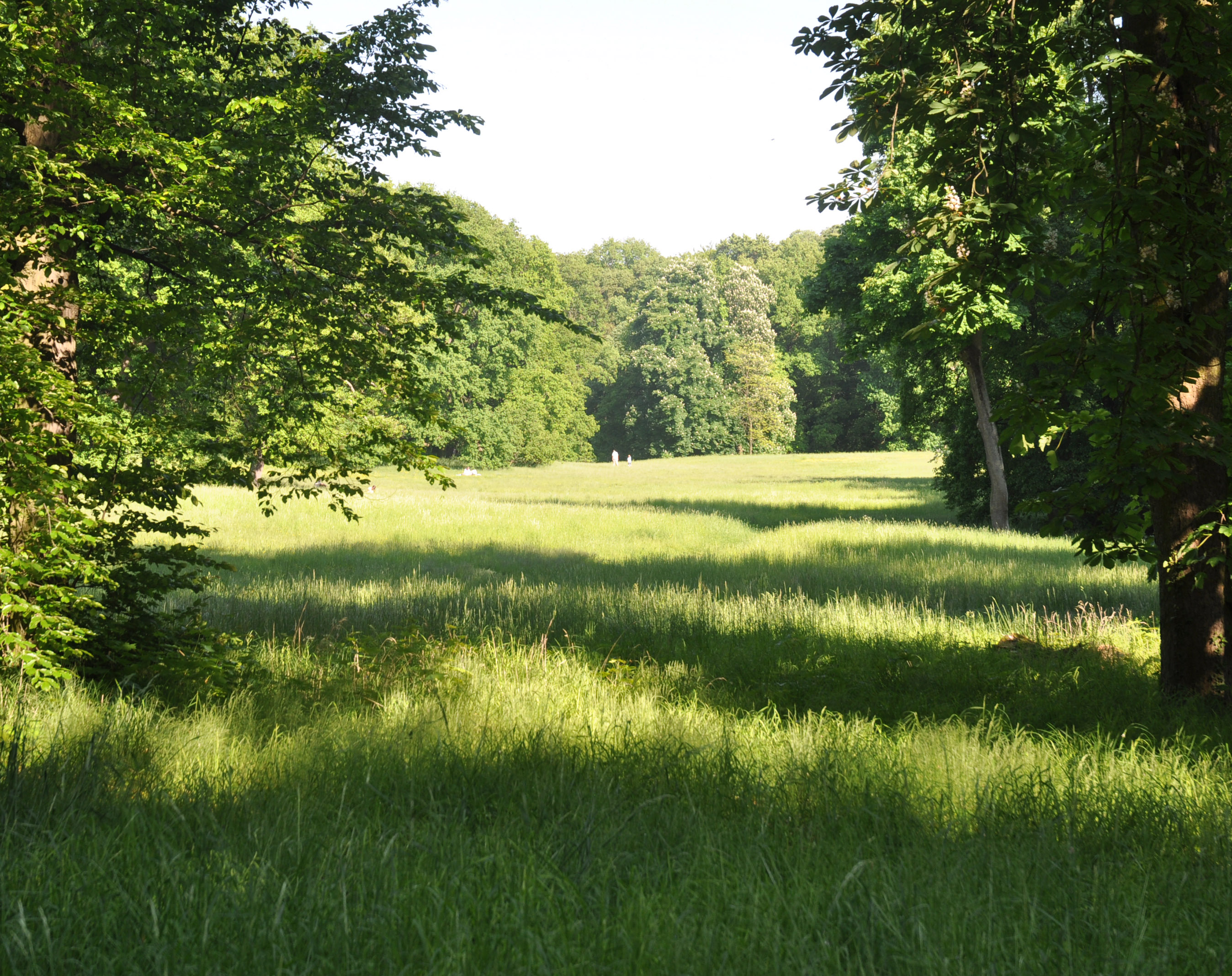 Blick vom westlichen Drive auf den Großen Wiesengrund